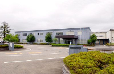 江沼チヱン製作所 本社工場写真